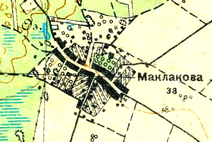 Топографическая карта Ленинградской области, квадрат О-35-23-А-а (Большая Систа), деревня Маклаково.